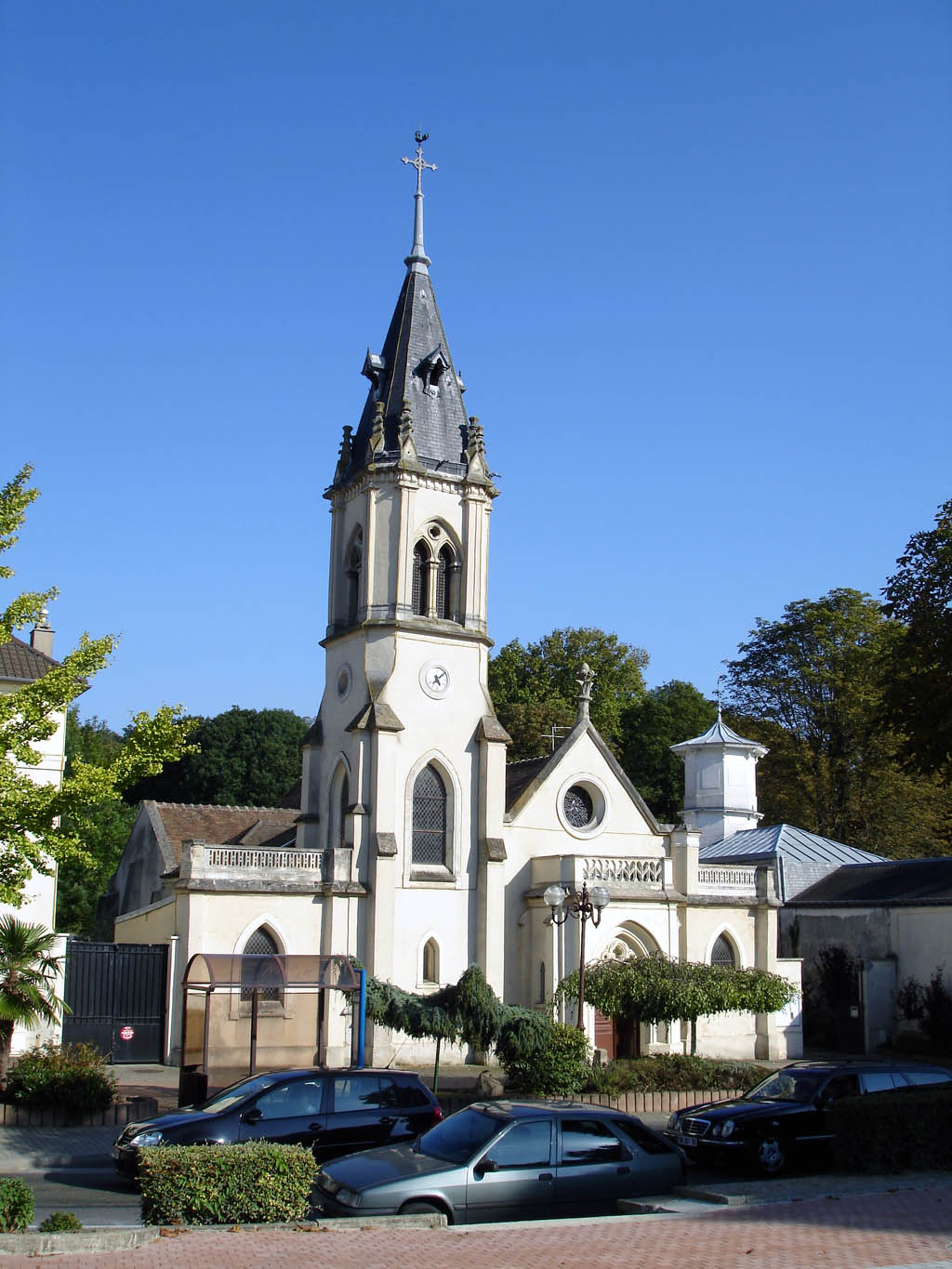 L'église Saint-André à Montlignon (Val-d'Oise), France